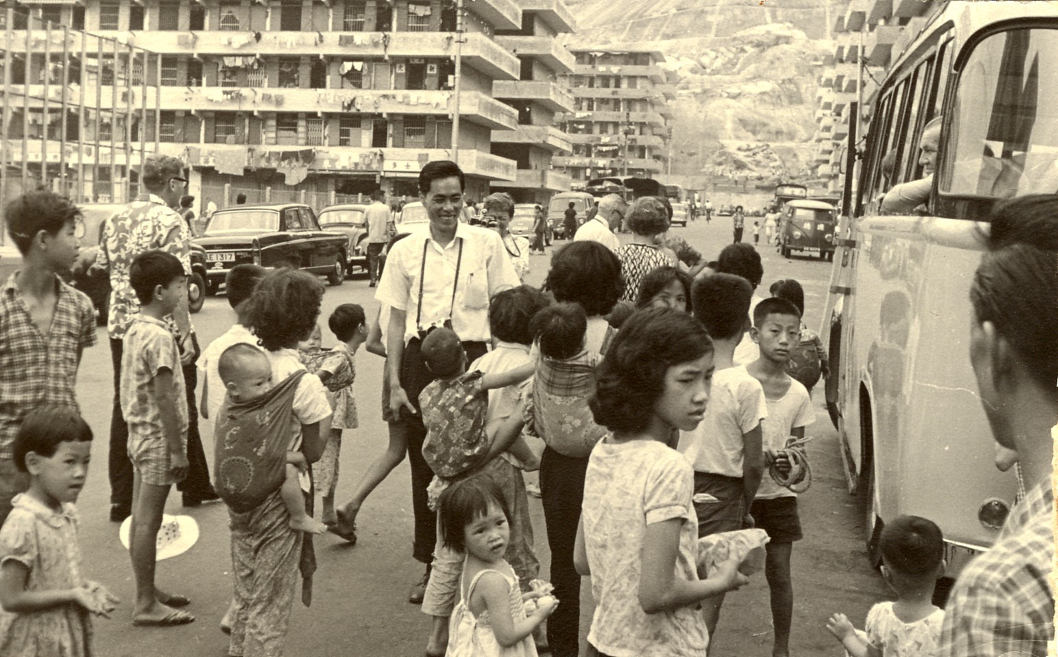 Children begging in 1965 Hong Kong Probably Shek Kip Mei Estate